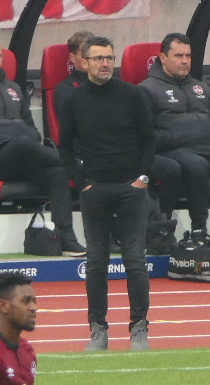 Der Fussballtrainer Michael Köllner vom 1.FC Nürnberg beim Heimspiel gegen Werder Bremen am 02.02.2019.